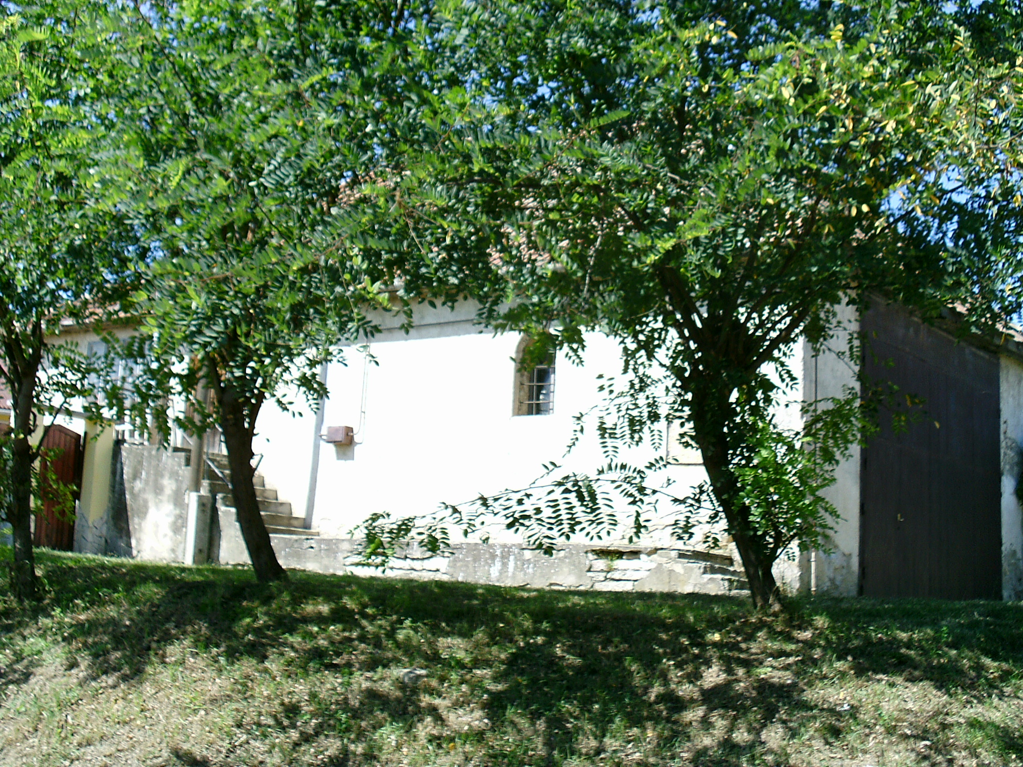 Verpelét, tűzoltószertár (zsinagóga)